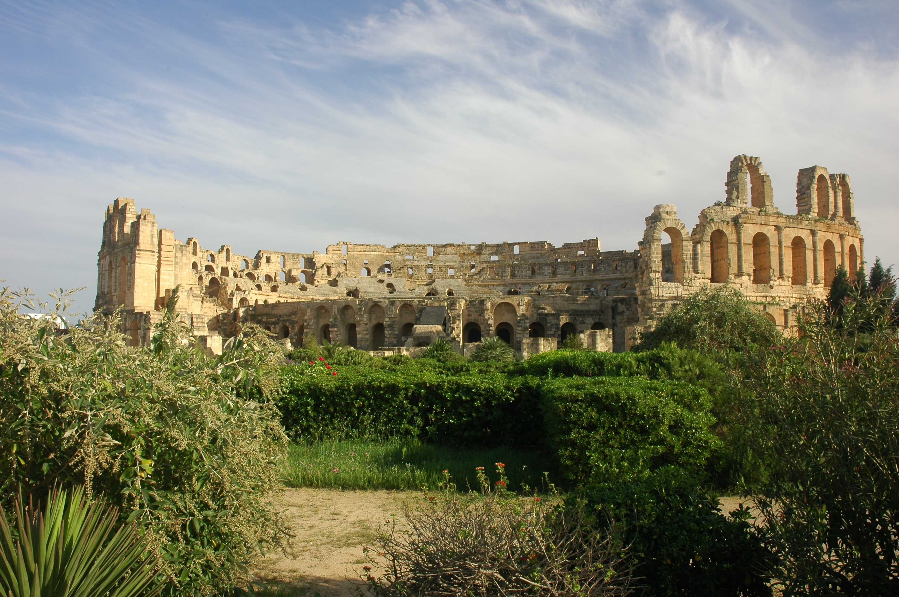 Amphithéatre d'EL'DJEM en Tunisie